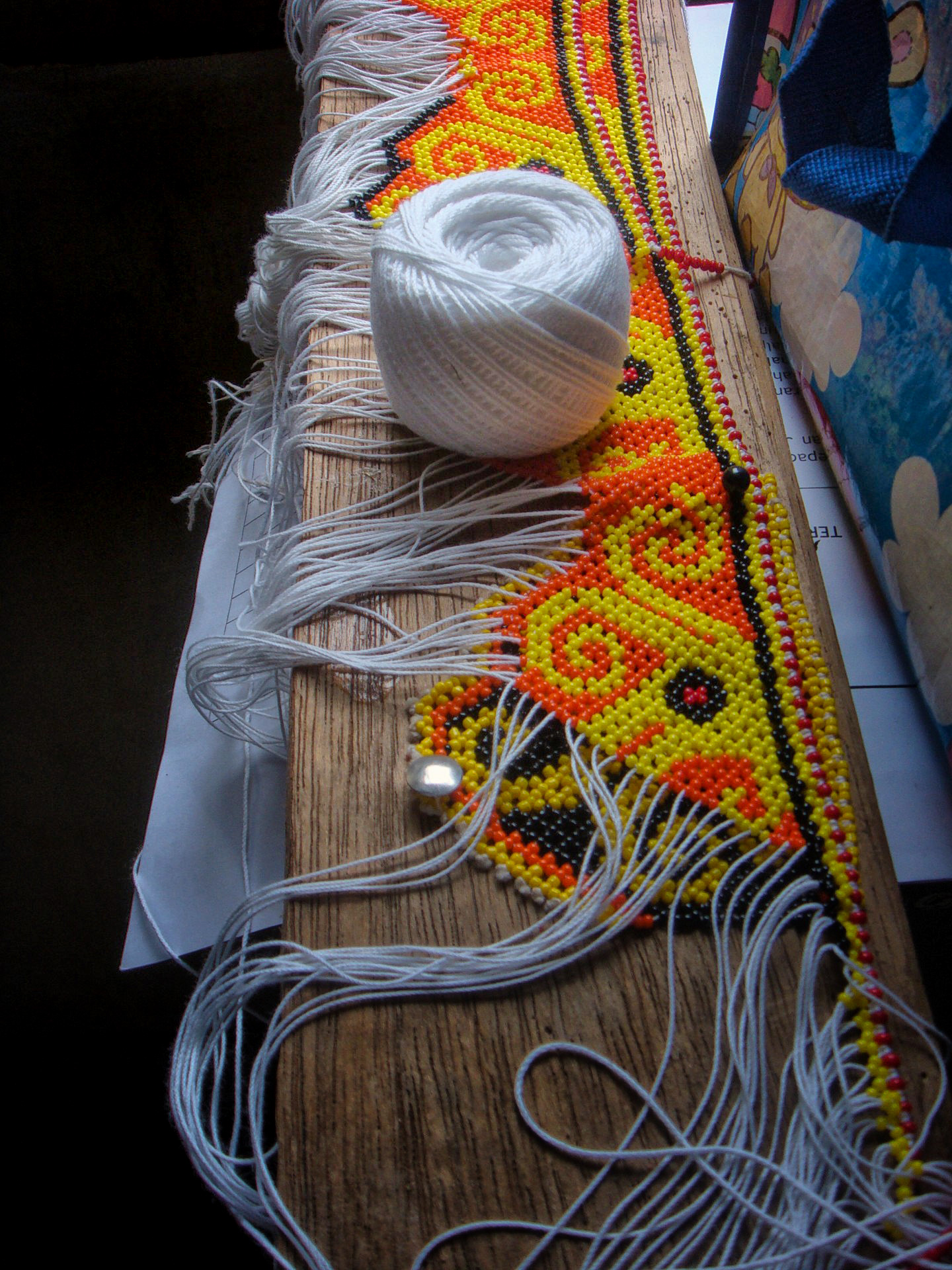 Sekapan Piit Tribe, Orang Ulu